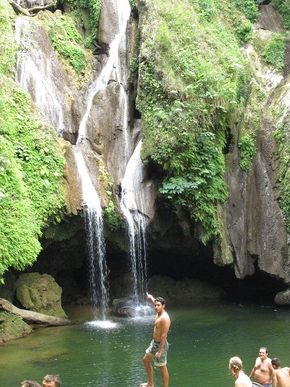 cascada